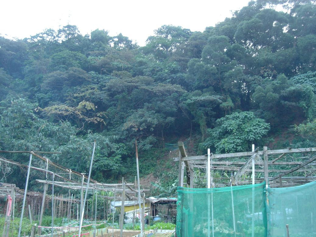 錦和運動公園後方的小山(中坑山南翼)Bân-lâm-gú: Kím-hô-ūn-tōng-kong-hn̂g āu-hong ê sió-suann(Tiong-khenn-suann lâm-i̍k)